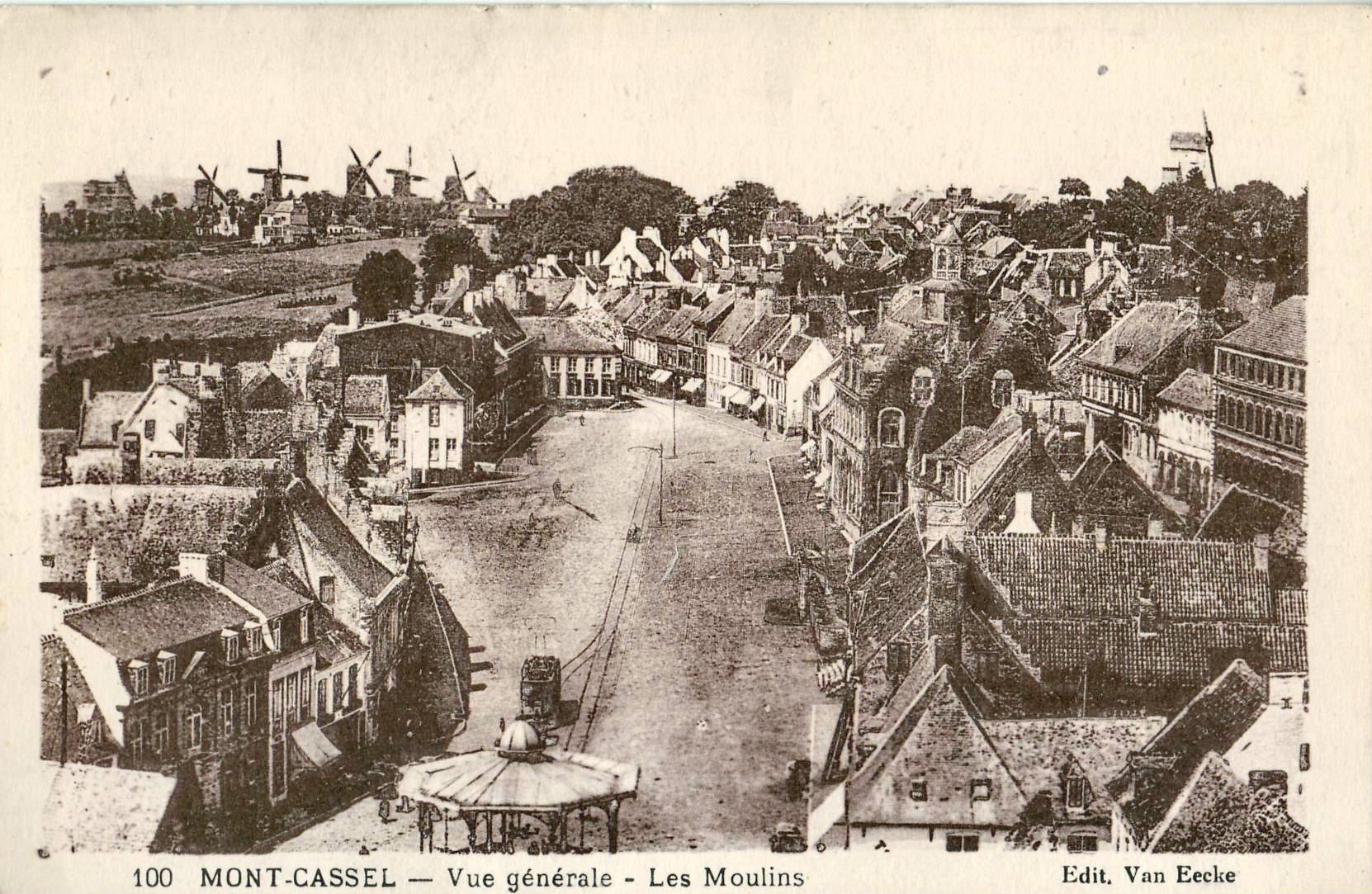 Carte postale ancienne éditée par MTIL pour Van Eecke : MONT-CASSEL - Vue générale - Les Moulins